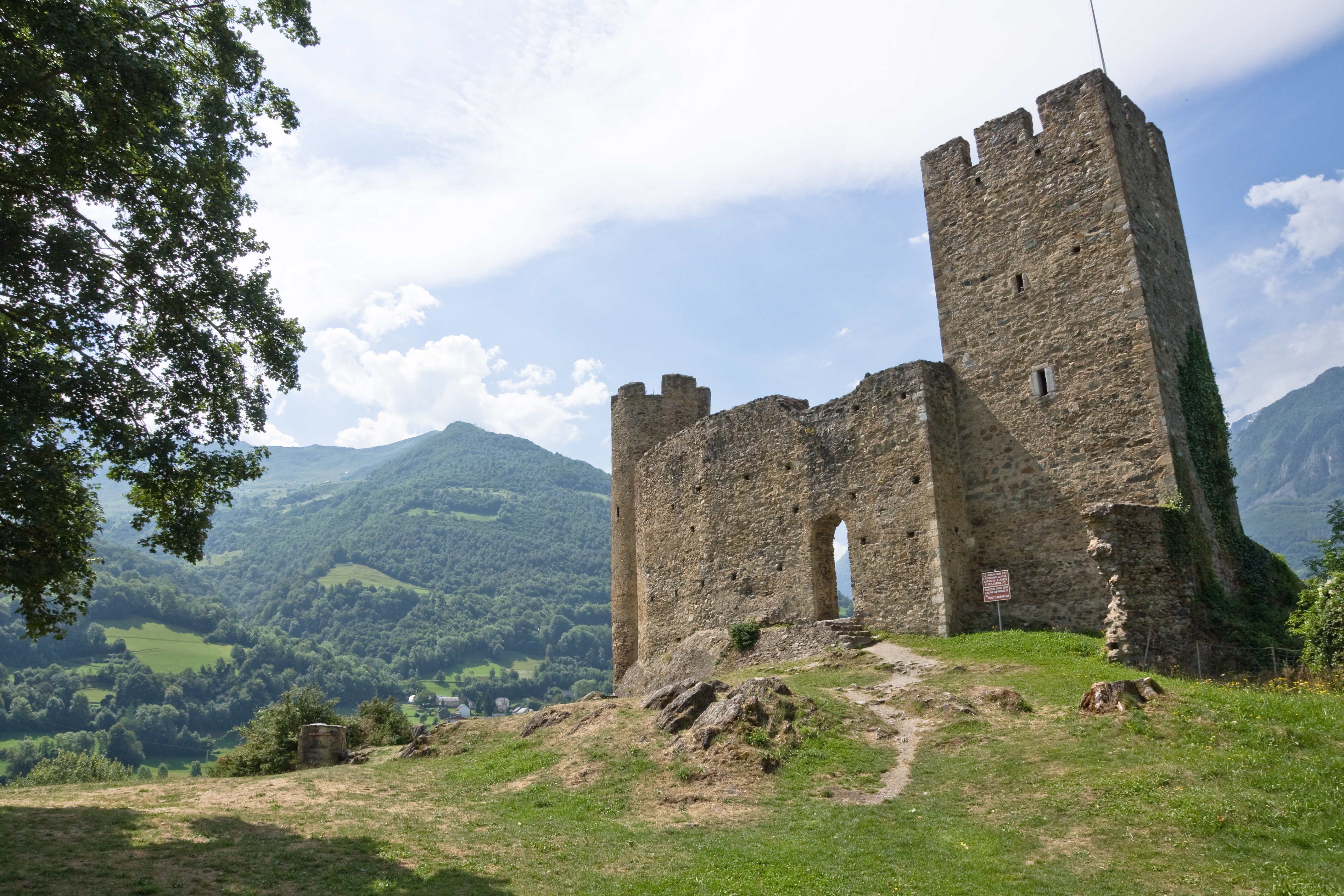 Chateau Sainte-Marie - Luz Saint Sauveur - Hautes Pyrénées